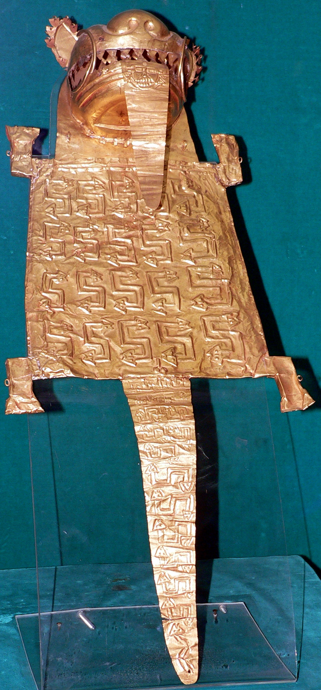 Descripción: Bolsa ceremonial Cultura: Frías (100 a.C. – 100 d.C.) Fundación: Fundación Miguel Mujica Gallo Museo: Museo Oro del Perú y Armas del Mundo Lugar: Lima, Perú Fotógrafo: © Manuel González Olaechea y Franco Fecha : 13 de julio de 2007